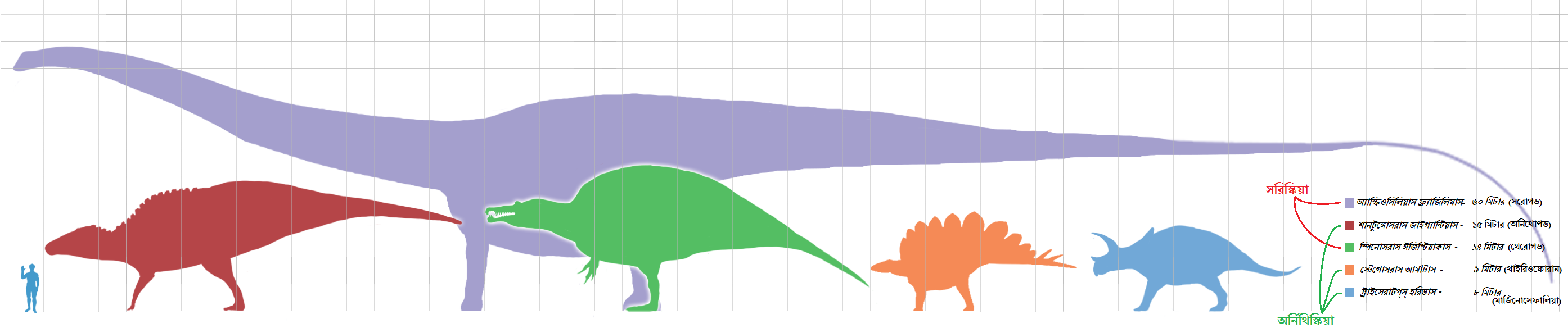 ডাইনোসরদের পাঁচটা প্রধান ক্লেডের বৃহত্তম প্রজাতিদের সাথে একজন মানুষের গড় আয়তনের তুলনা।